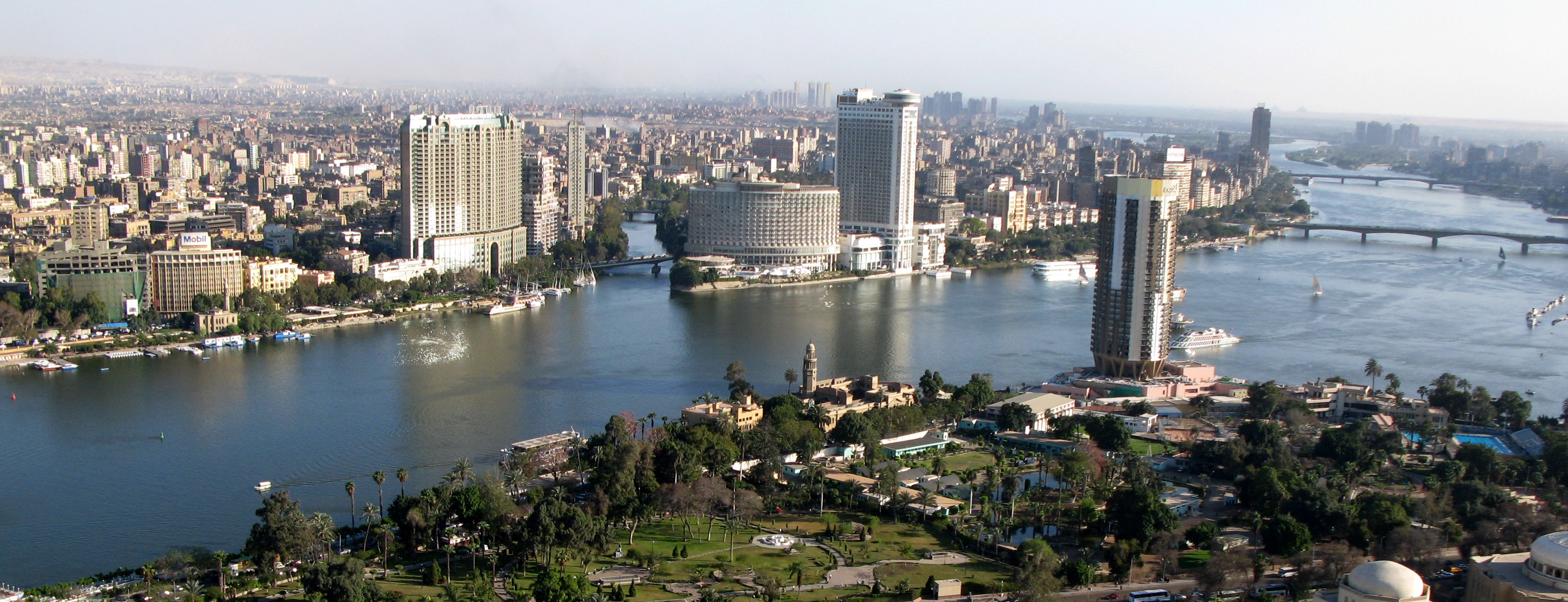 Vue op Kairo.